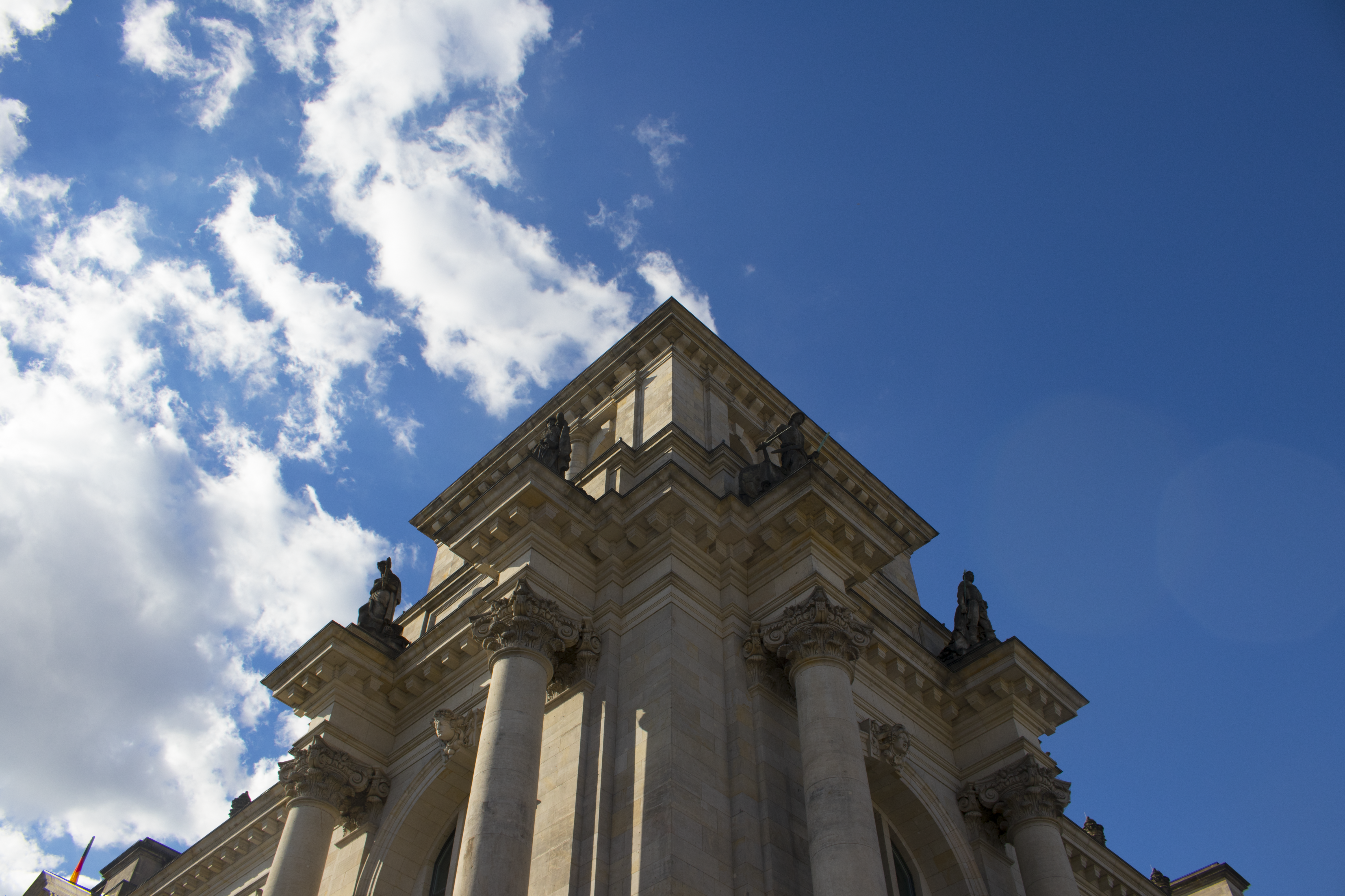 A corner of Bundestag building - photographed in Summer 2016.